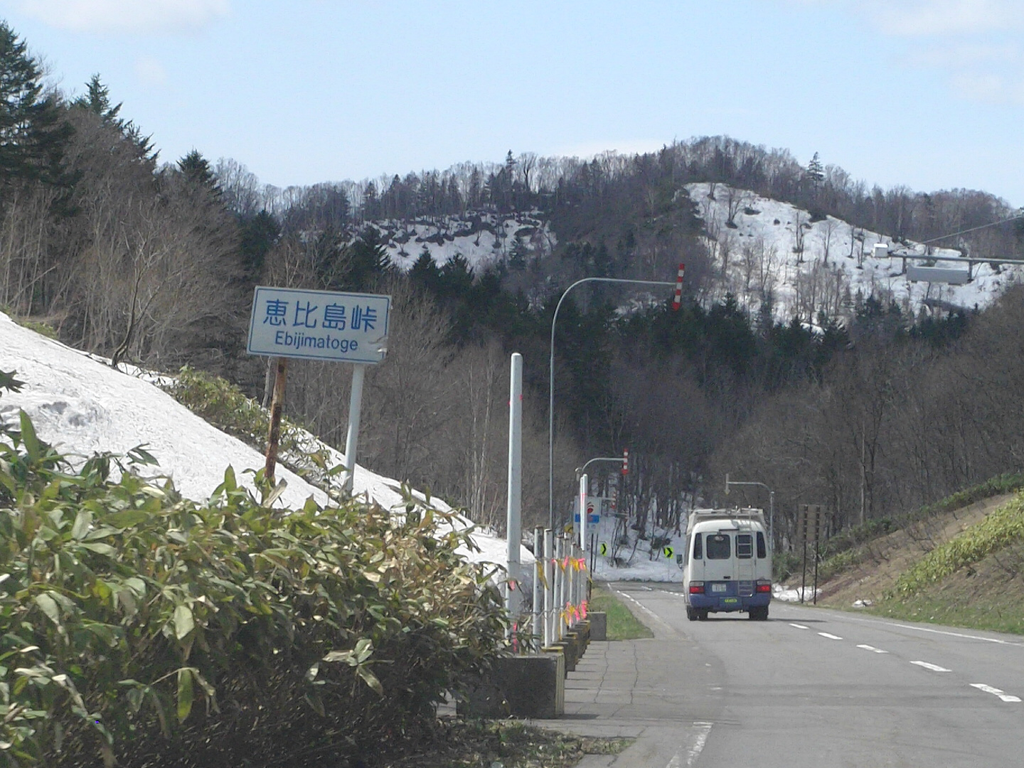 道道549号の恵比島峠